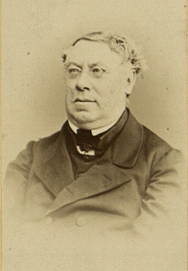 Franz Xaver Reithmayr (1809-1872) katholischer Theologieprofessor in München